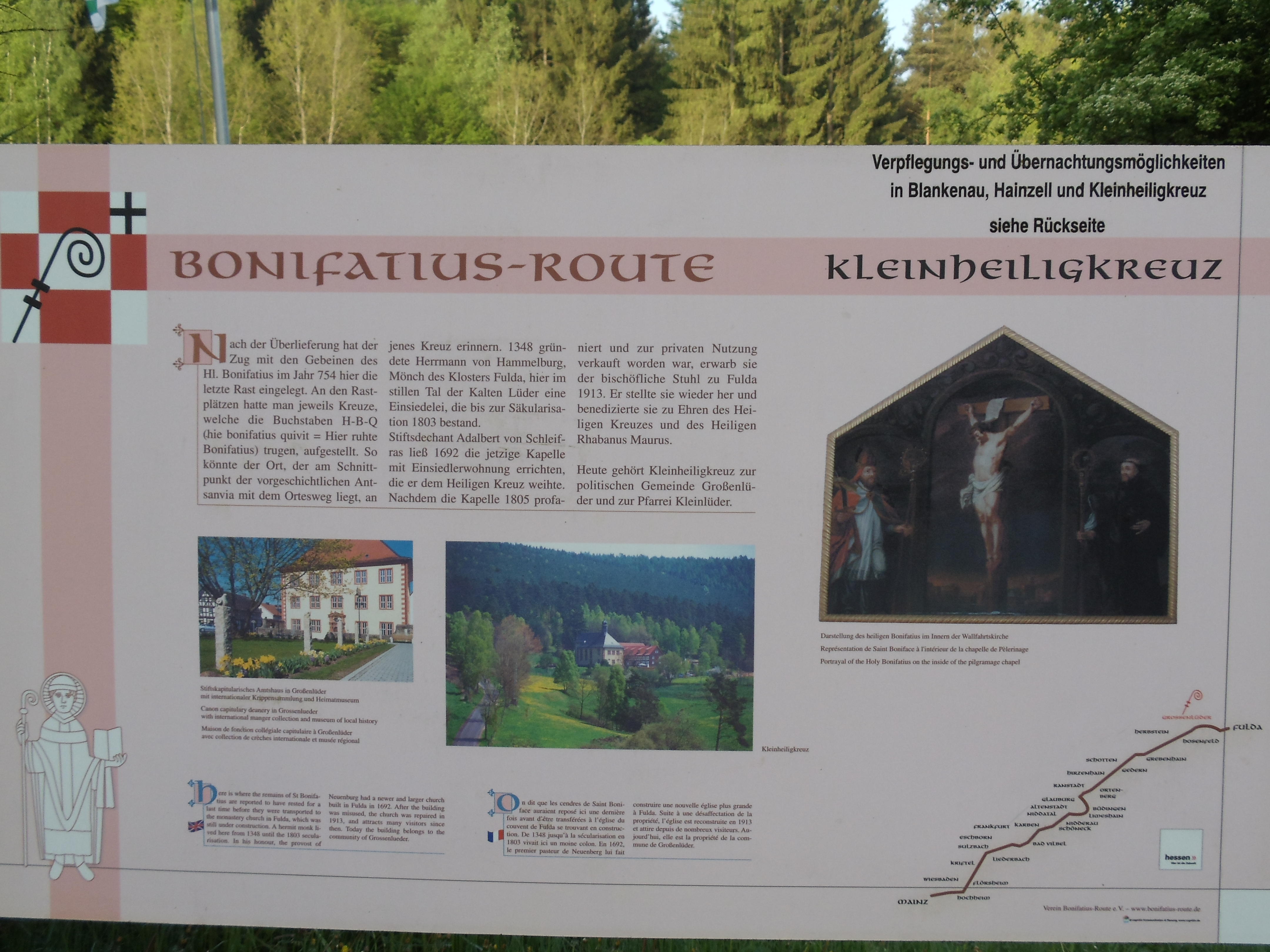 Informationstafel Bonifatiusroute Kleinheiligenkreuz in der Nähe von Fulda